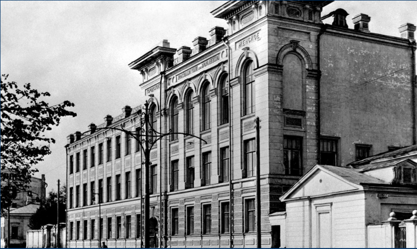 Здание женского профессионального училища имени Варвары Лепёшкиной в Москве. Фотография 1910-е гг. Здание разрушено при авианалёте в 1941 году.